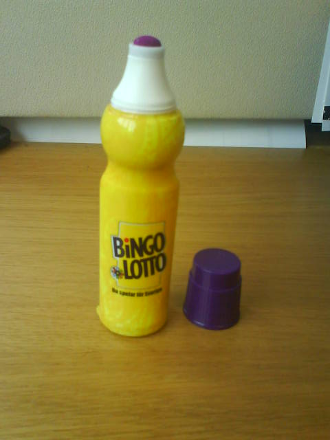 Så kallad duttpenna använd för markering av bingobrickor.